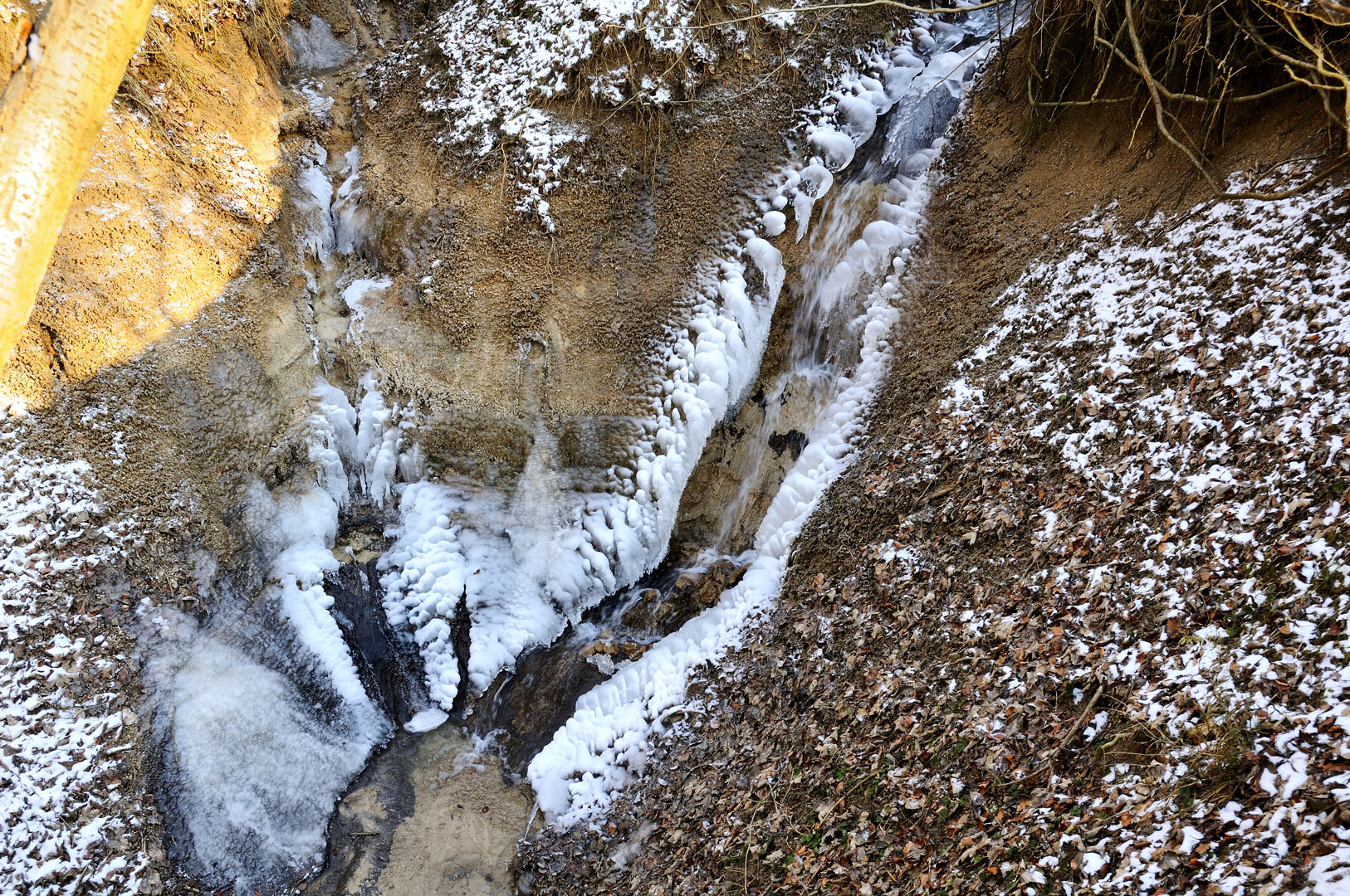 Wanfried-Elfengrund Wasserfall im Feb. 2012